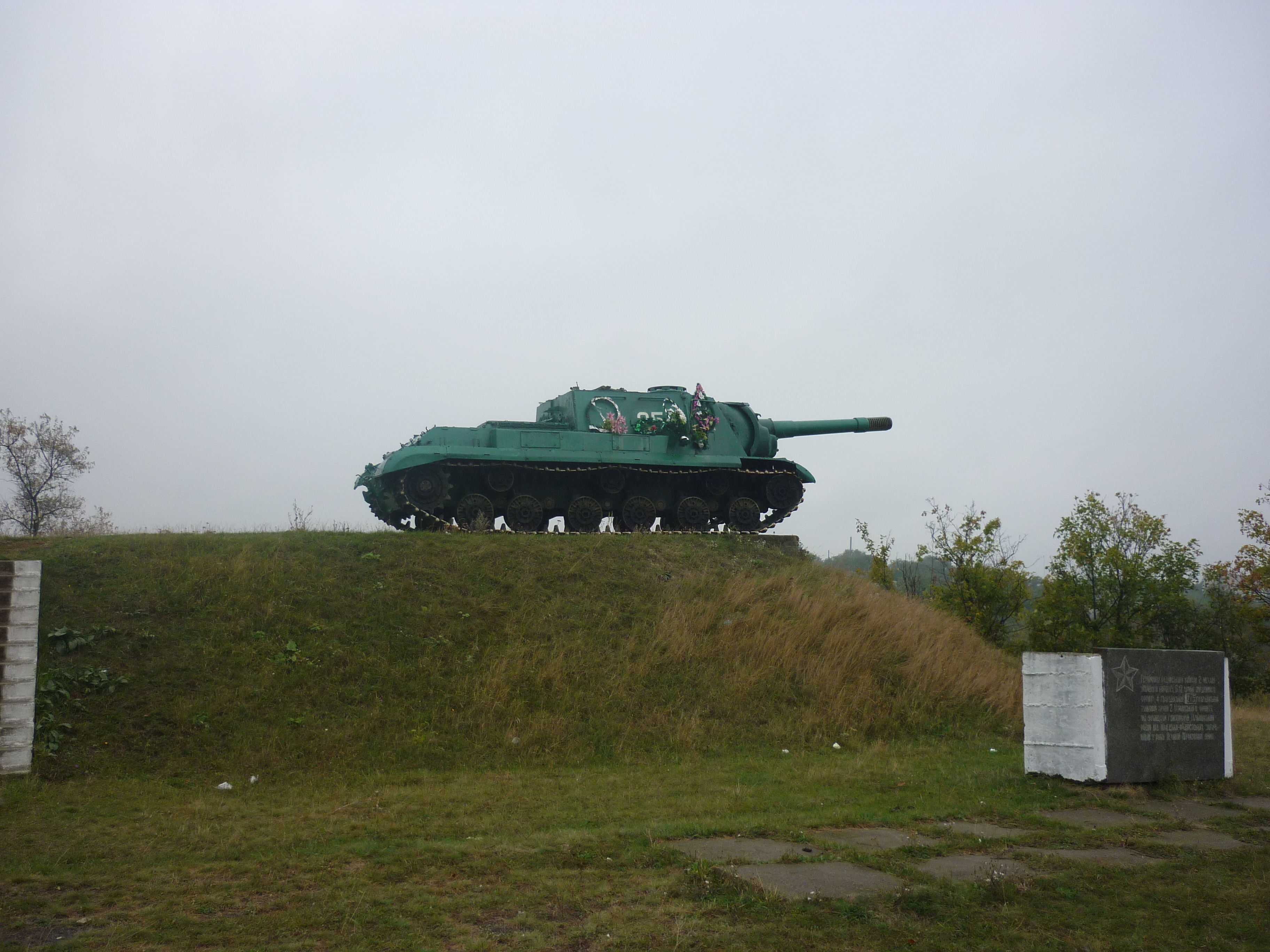 Пам'ятник воїнам-визволителям міста Тального